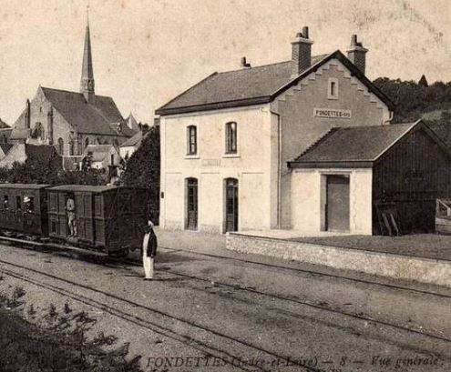 Carte postale figurant l'ancienne gare de Fondettes au 19e siècle.